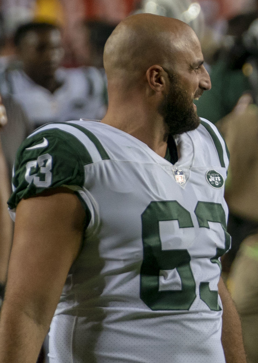 Jets at Redskins 8/16/18